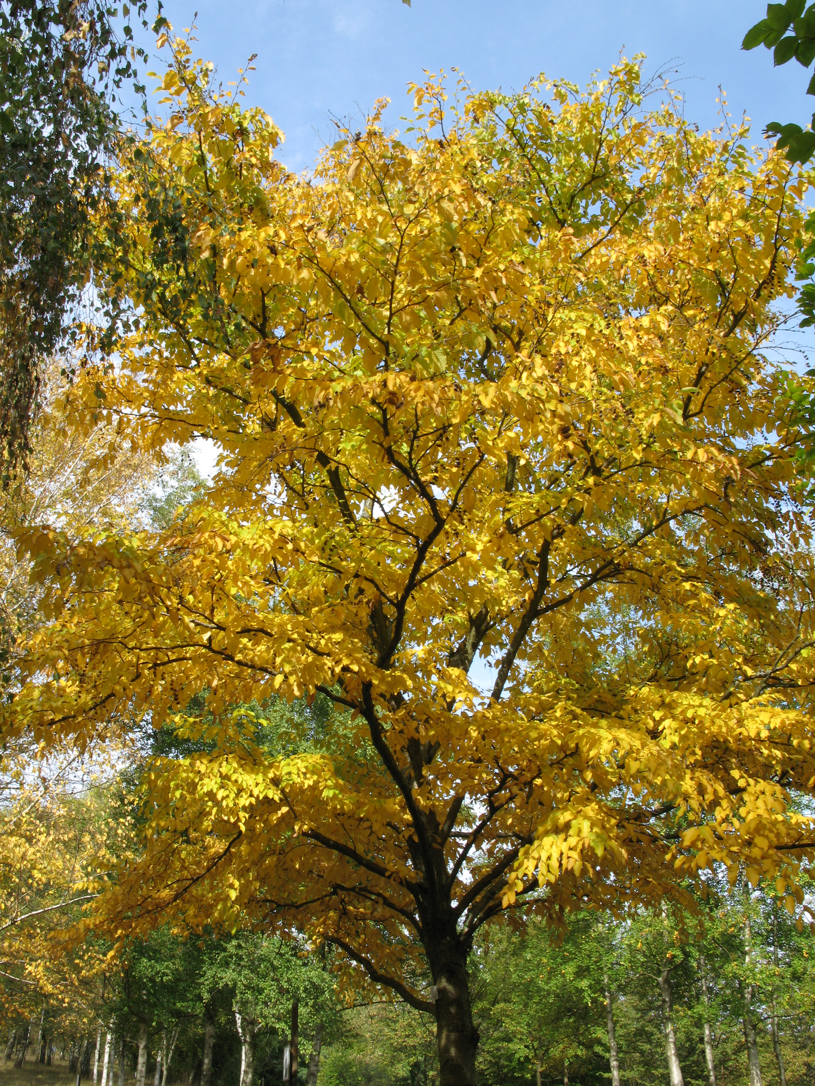 Zuckerbirke im Liliental im Kaiserstuhl bei Ihringen.